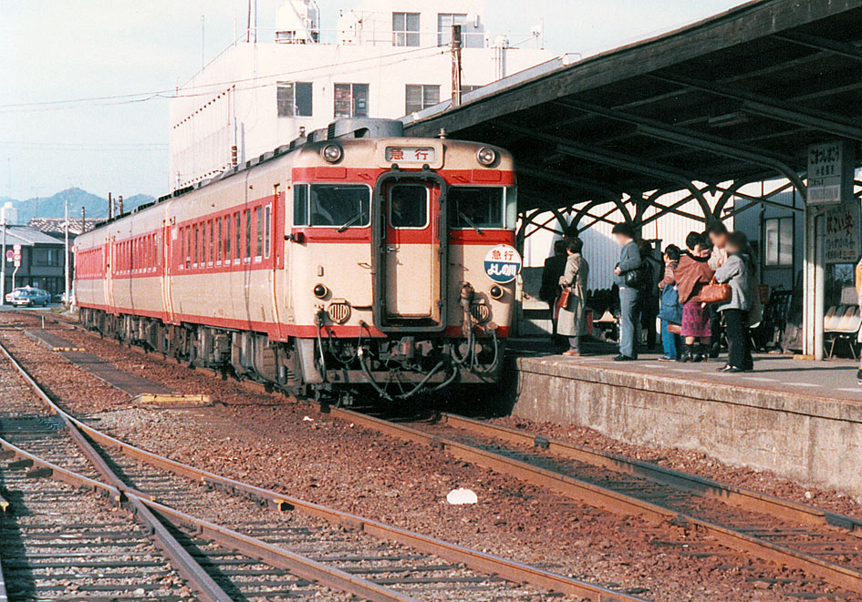 国鉄小松島港（仮）駅に到着する快速列車（徳島まで急行よしの川）